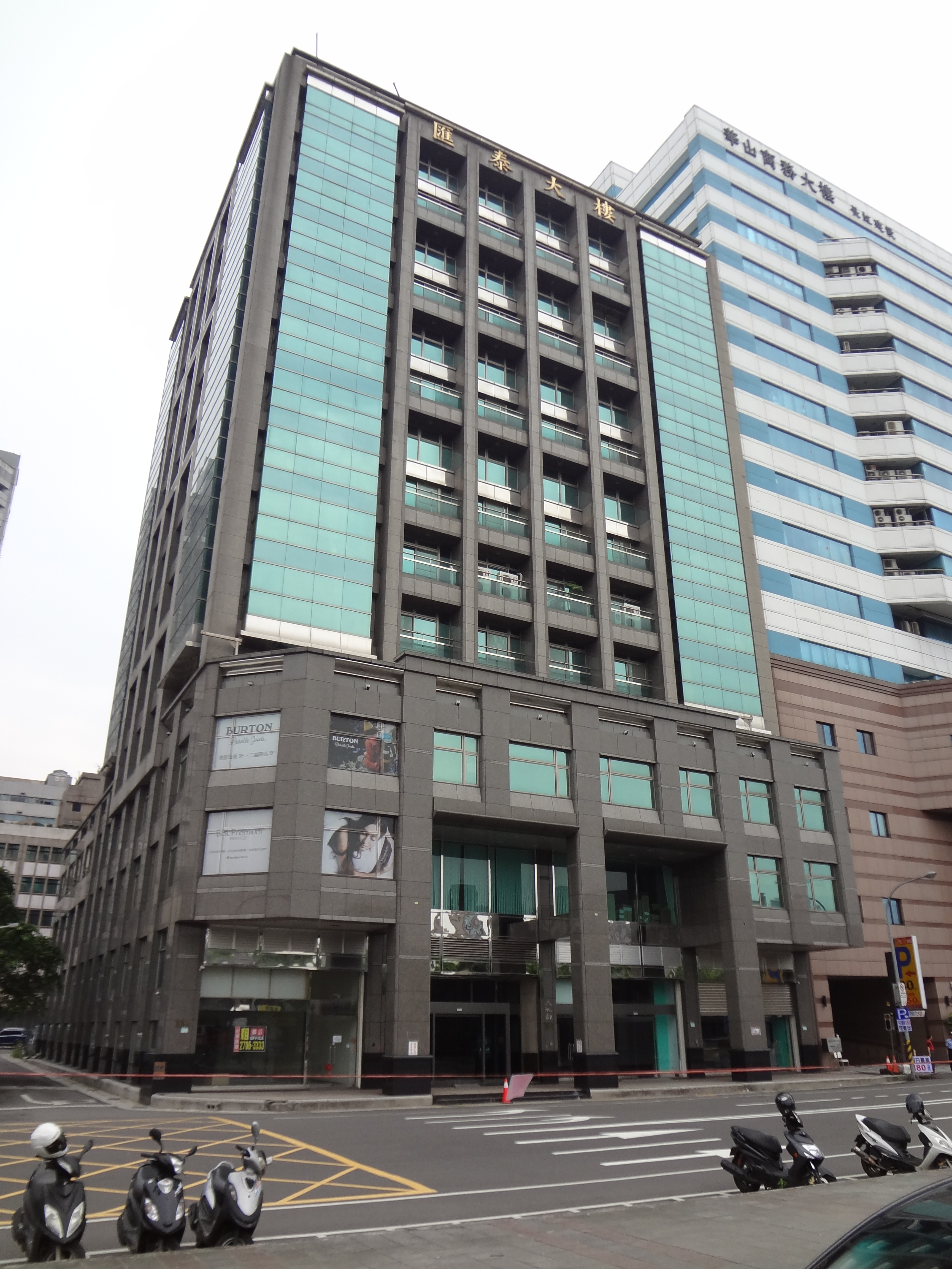 匯泰大樓，位於臺北市中正區北平東路30之1至30之5號。